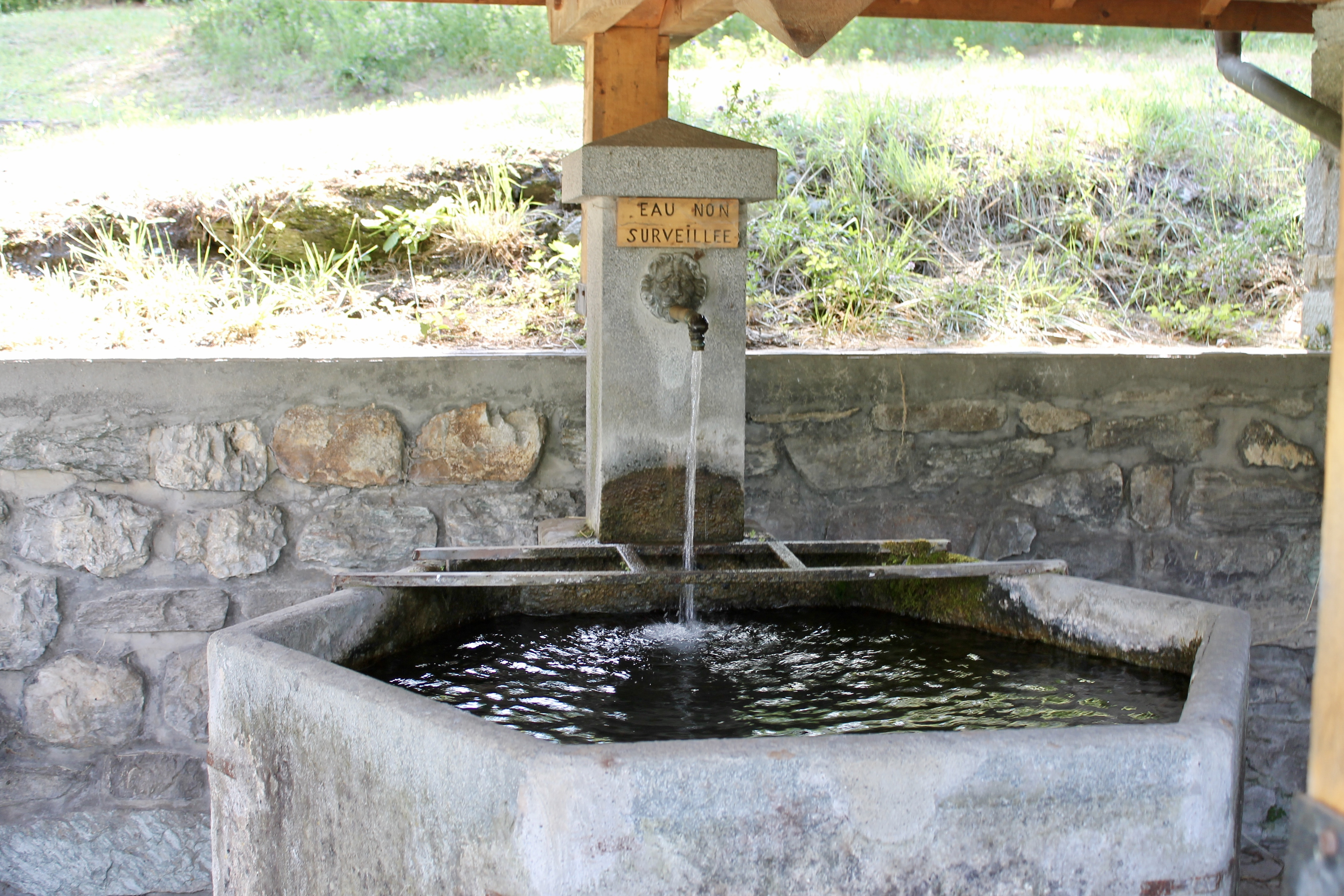 Bassin hexagonal du chef-lieu du Bois (juillet 2018).